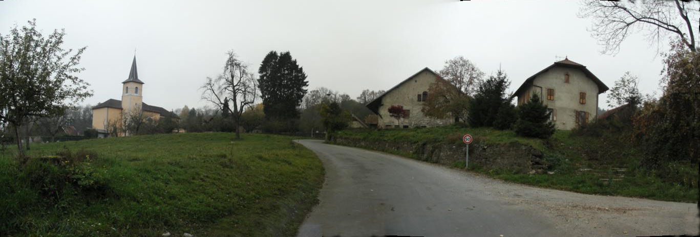 Zicht op Persjussy vanaf het buurtschap La Molasse